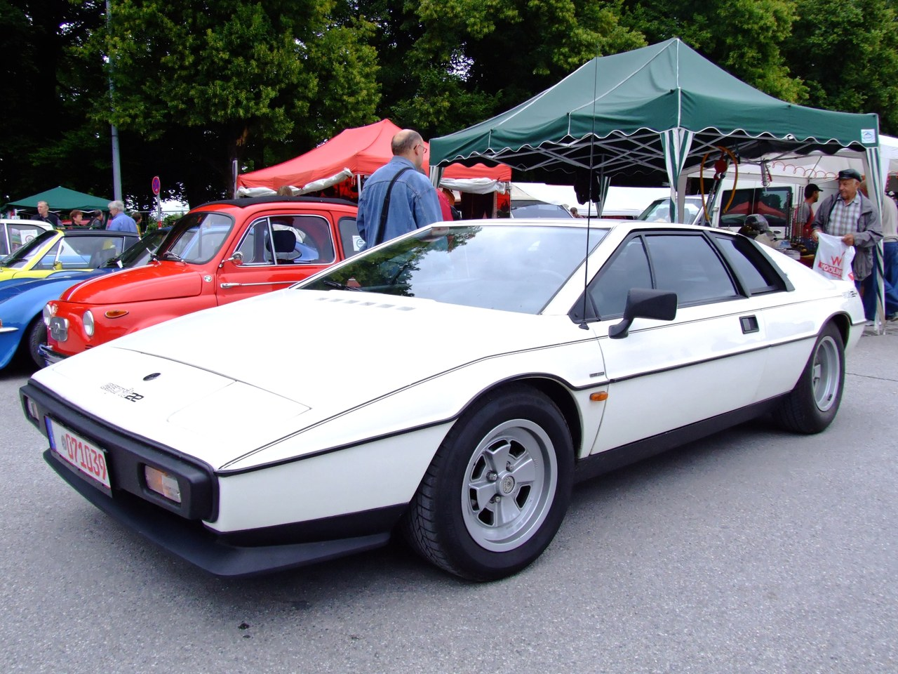 Quelle: selbst fotografiert, 07/2007 Fotograf: Späth Chr.